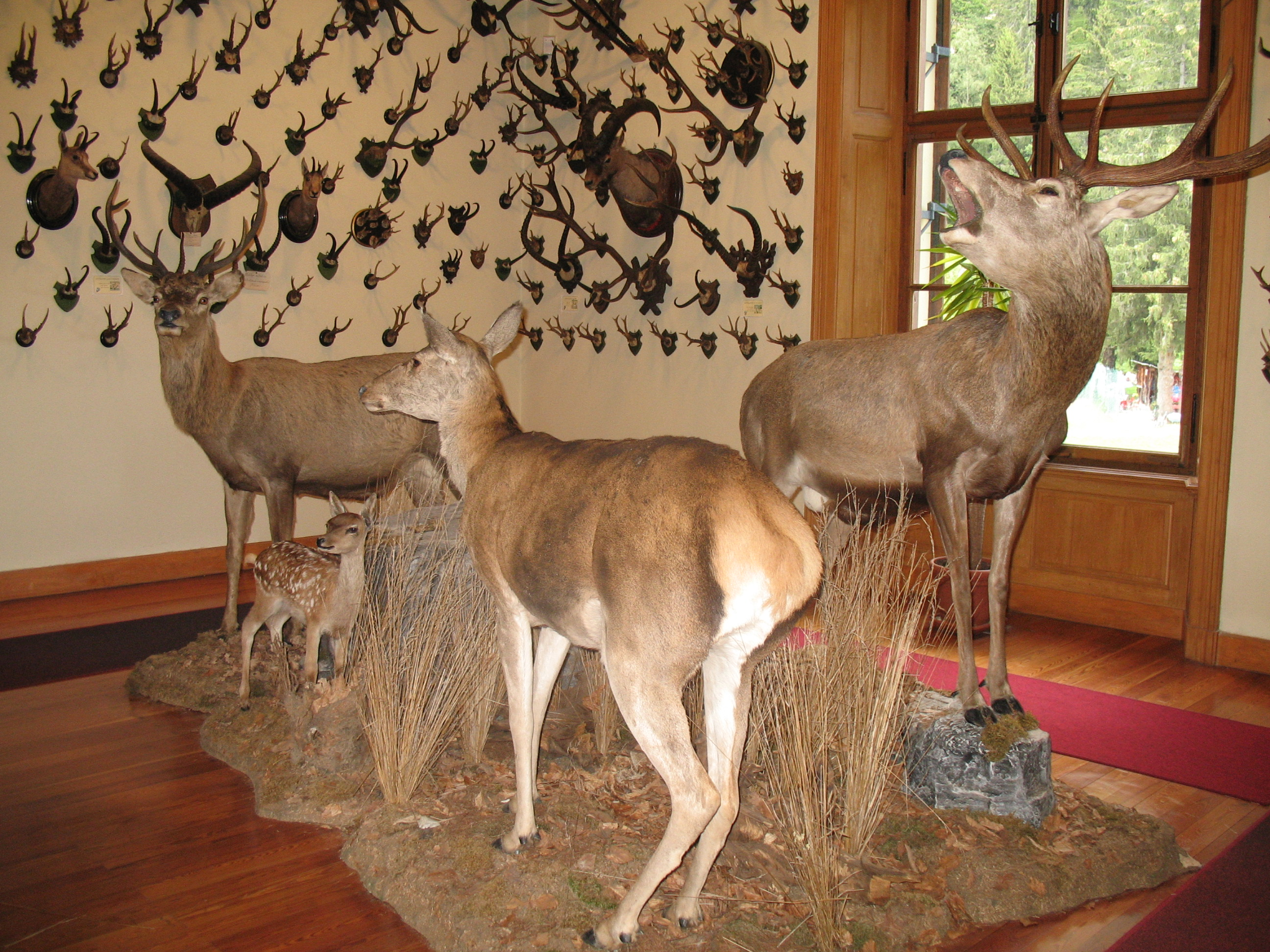 Immagine da Gressoney-Saint-Jean, Val d'Aosta - Museo Regionale della Fauna Alpina - Alpenfaunamuseum "Beck-Peccoz" - cervus elaphus